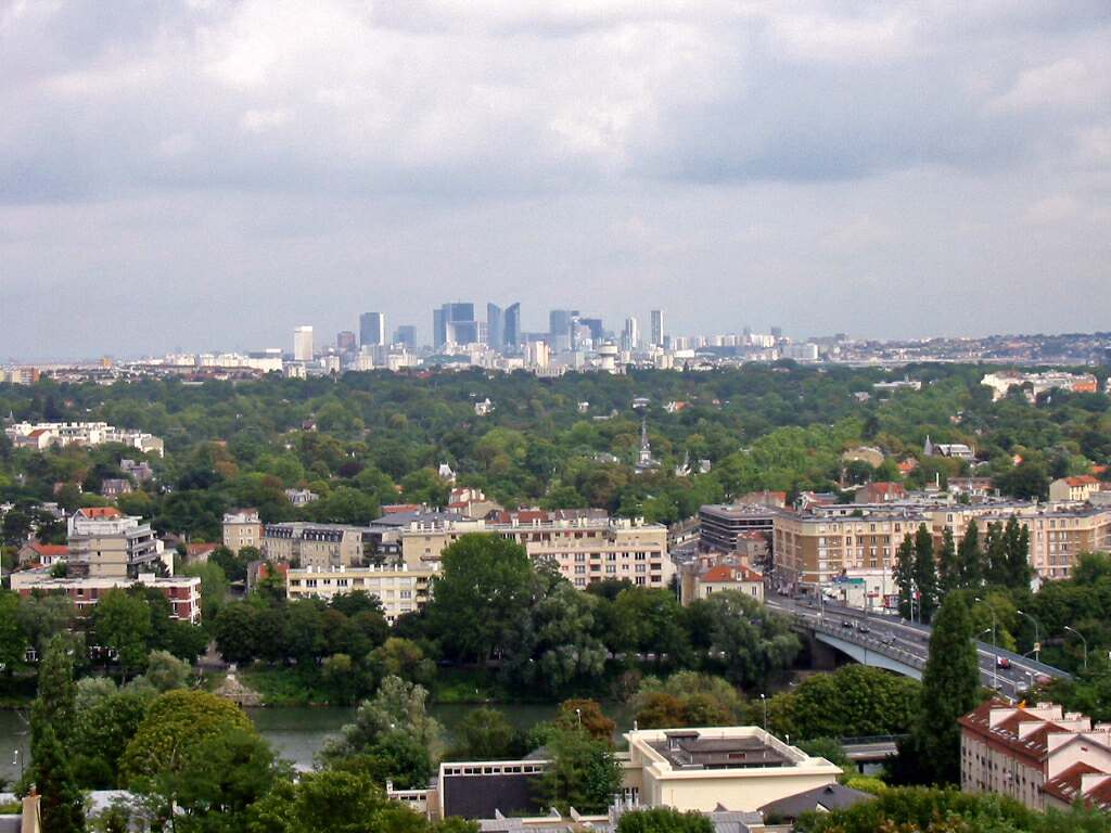 Le Pecq (Yvelines) vu de la terrasse du château de Saint-Germain-en-Laye (à l'horizon, les tours de La Défense) Photo JH Mora, août 2005 Catégorie:Image du Pecq Pecq